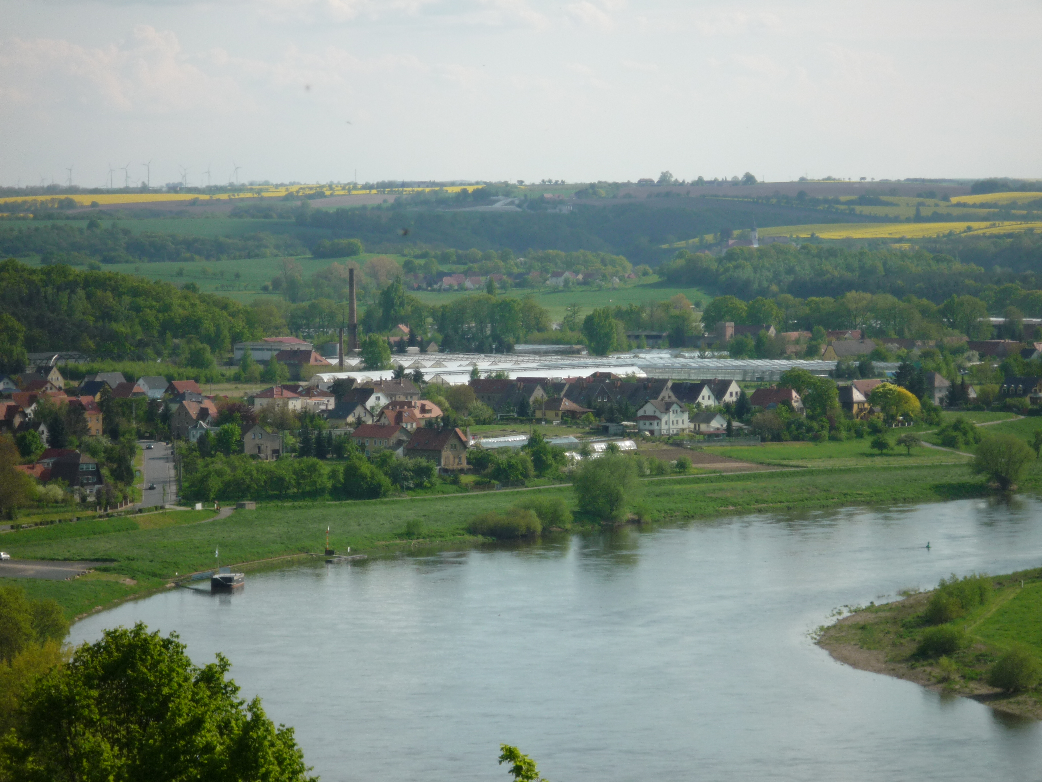 Blick auf Nieschütz, rechtselbischer Ortsteil von Diera-Zehren von der Goldkuppe (rechte Elbseite) aus fotografiert. Im Vordergrund die Elbe, im Hintergrund die weitere Elblandschaft Richtung Süd-Süd-West